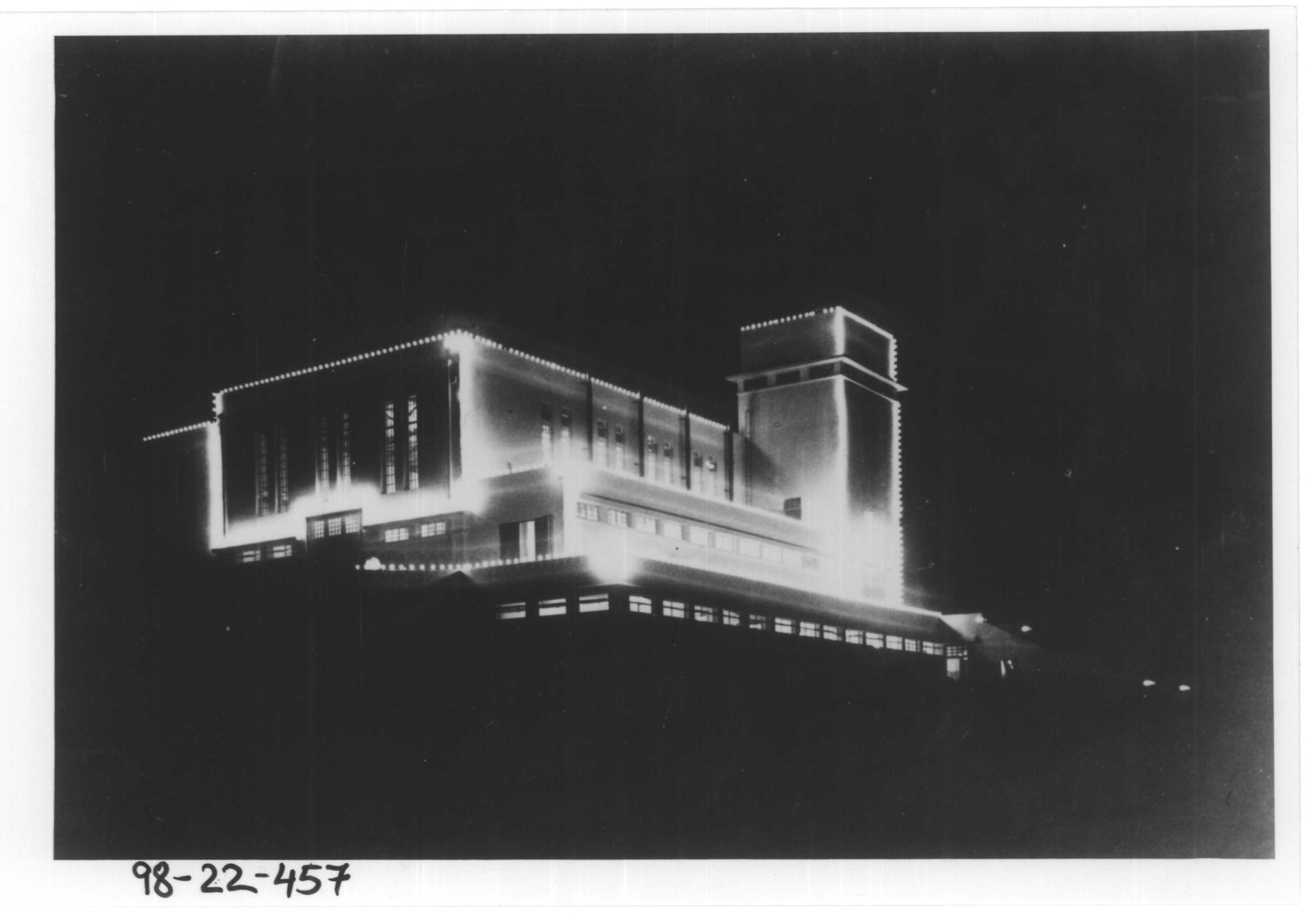 תיעוד תחנת הכוח הראשונה בחיפה